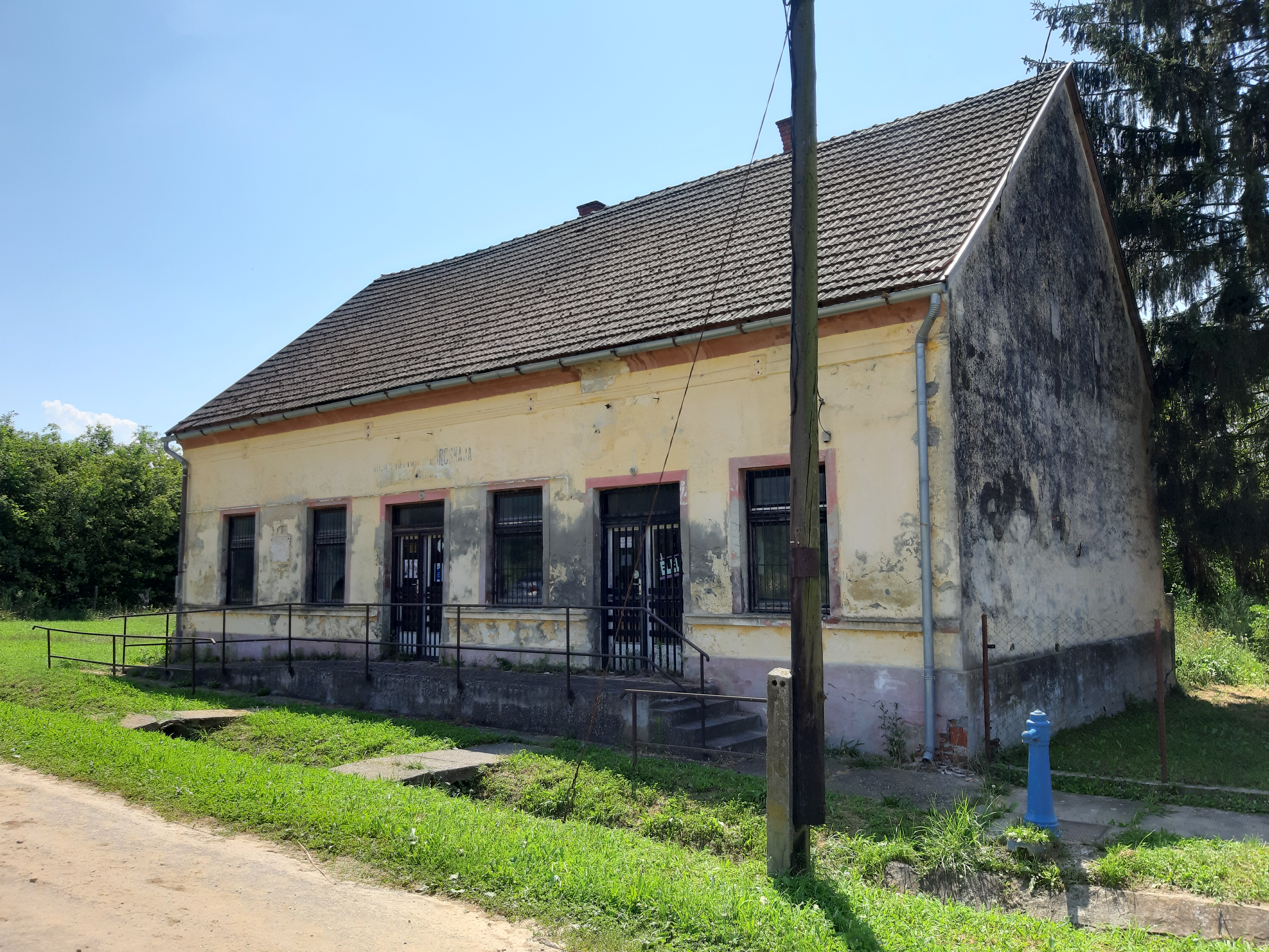 7584 Rinyaújnép, Gábor Andor utca 33.